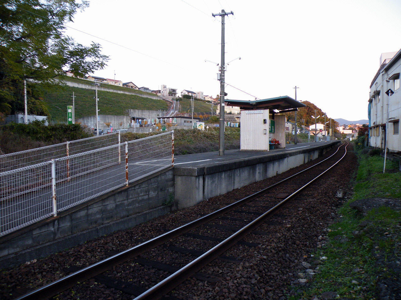 松浦鉄道西九州線中里駅